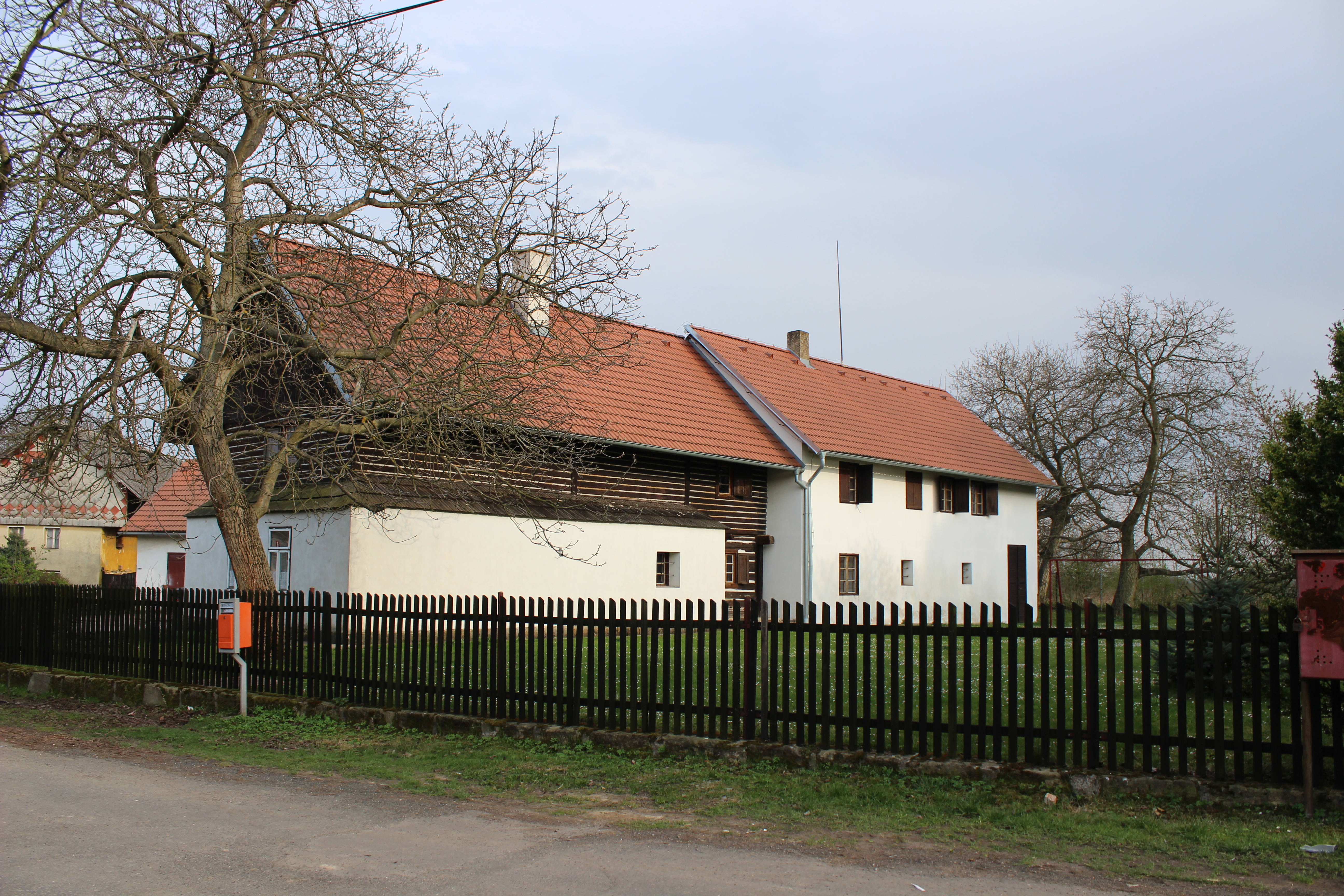 Dům číslo popisné 6 v Ostrém, části Stránky. This photograph was taken with a Canon EOS 600D